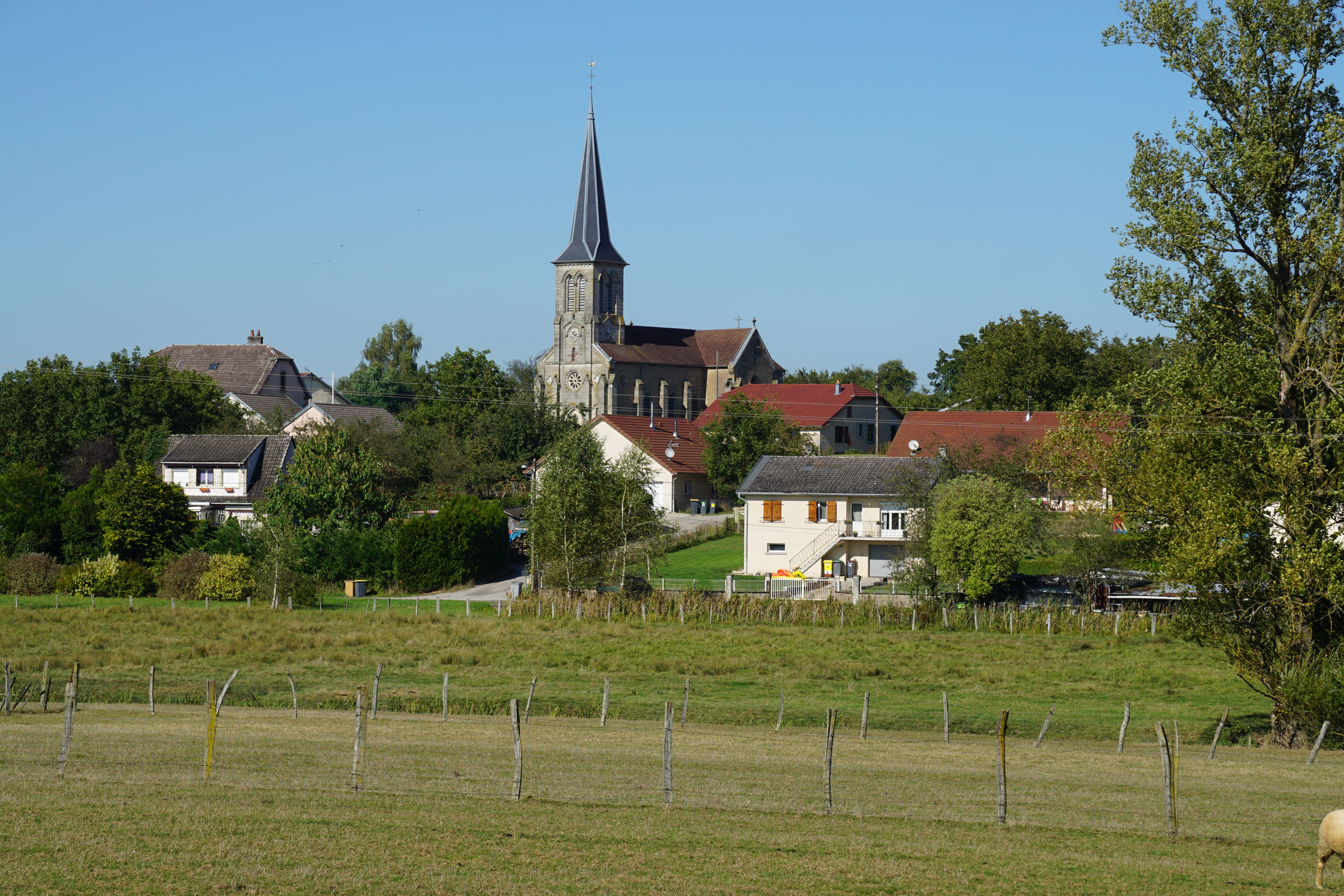 Bouhans-lès-Lure et son église.